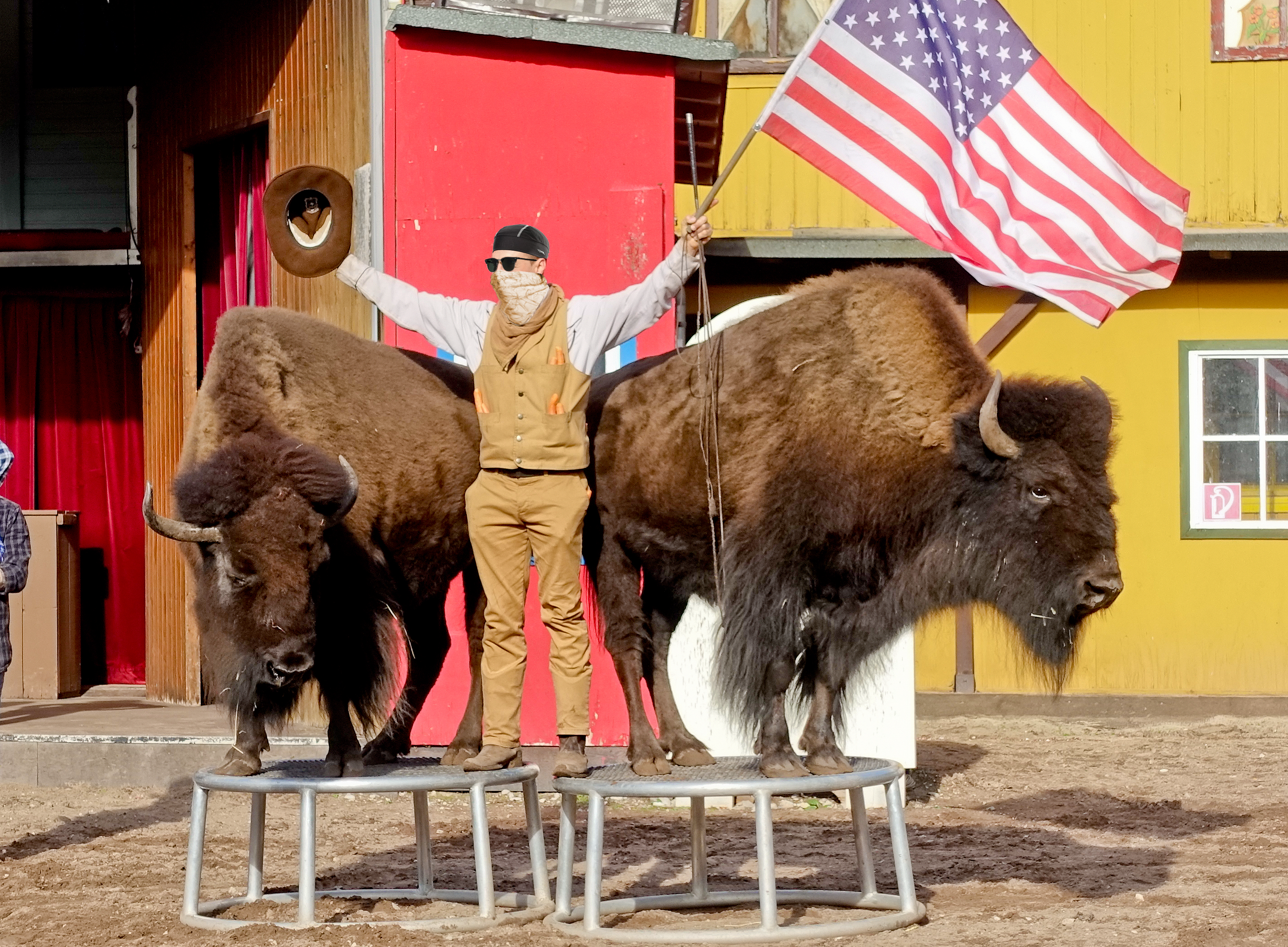 Marcel Krämer zeigt dressierte Bisons im Safariland Stukenbrock in Schloss Holte-Stukenbrock. Er ist laut SAT-1 Reportage vom 27. März 2018 weltweit einer von drei Menschen, die Bisons dressiert haben.